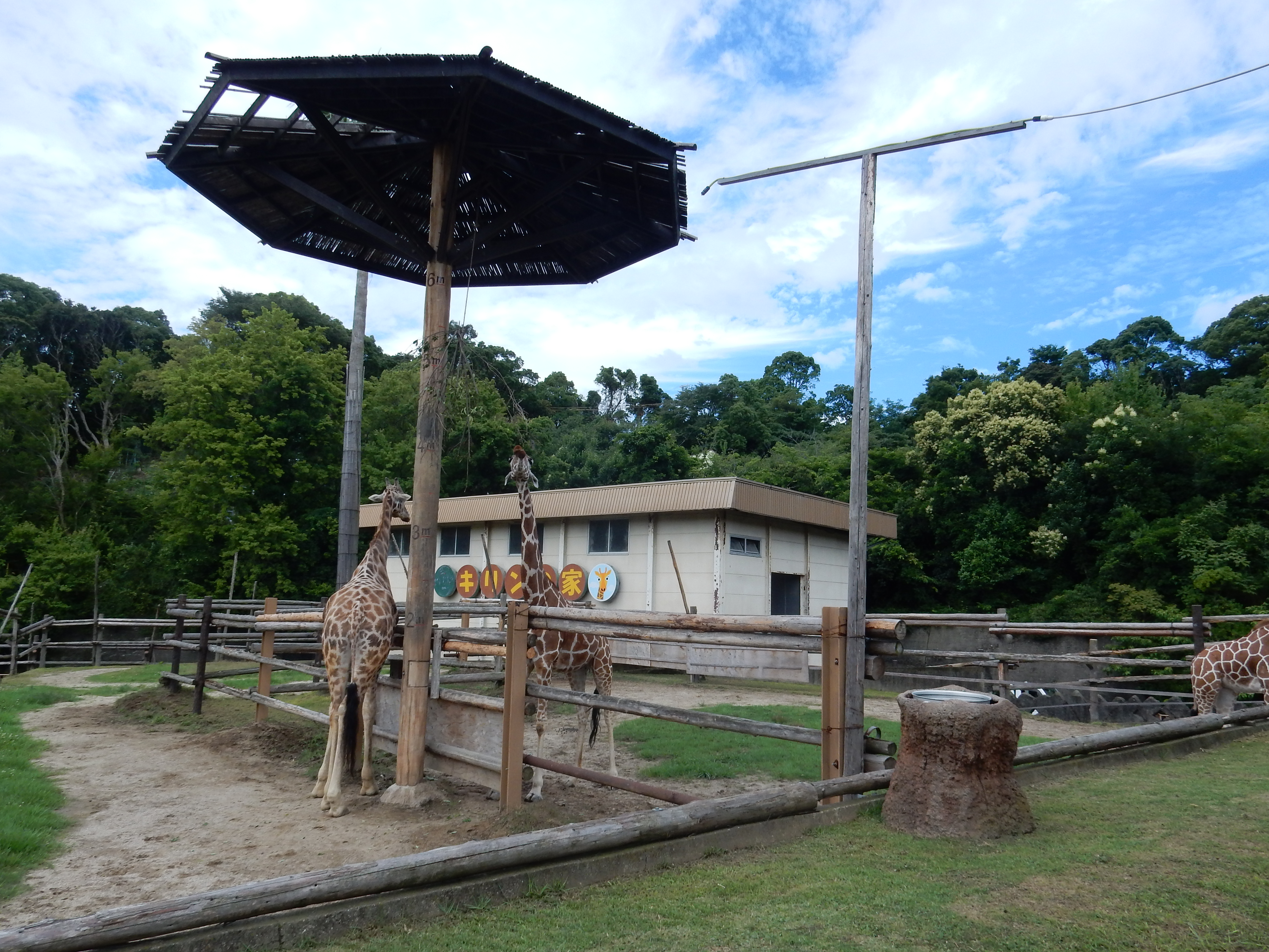 みさき公園の動物園で飼育されているキリン